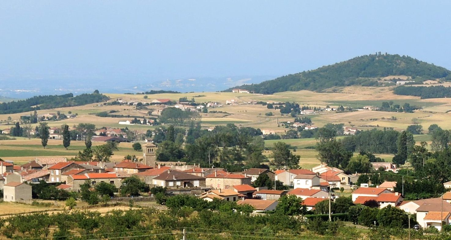 St-Jeure vue générale